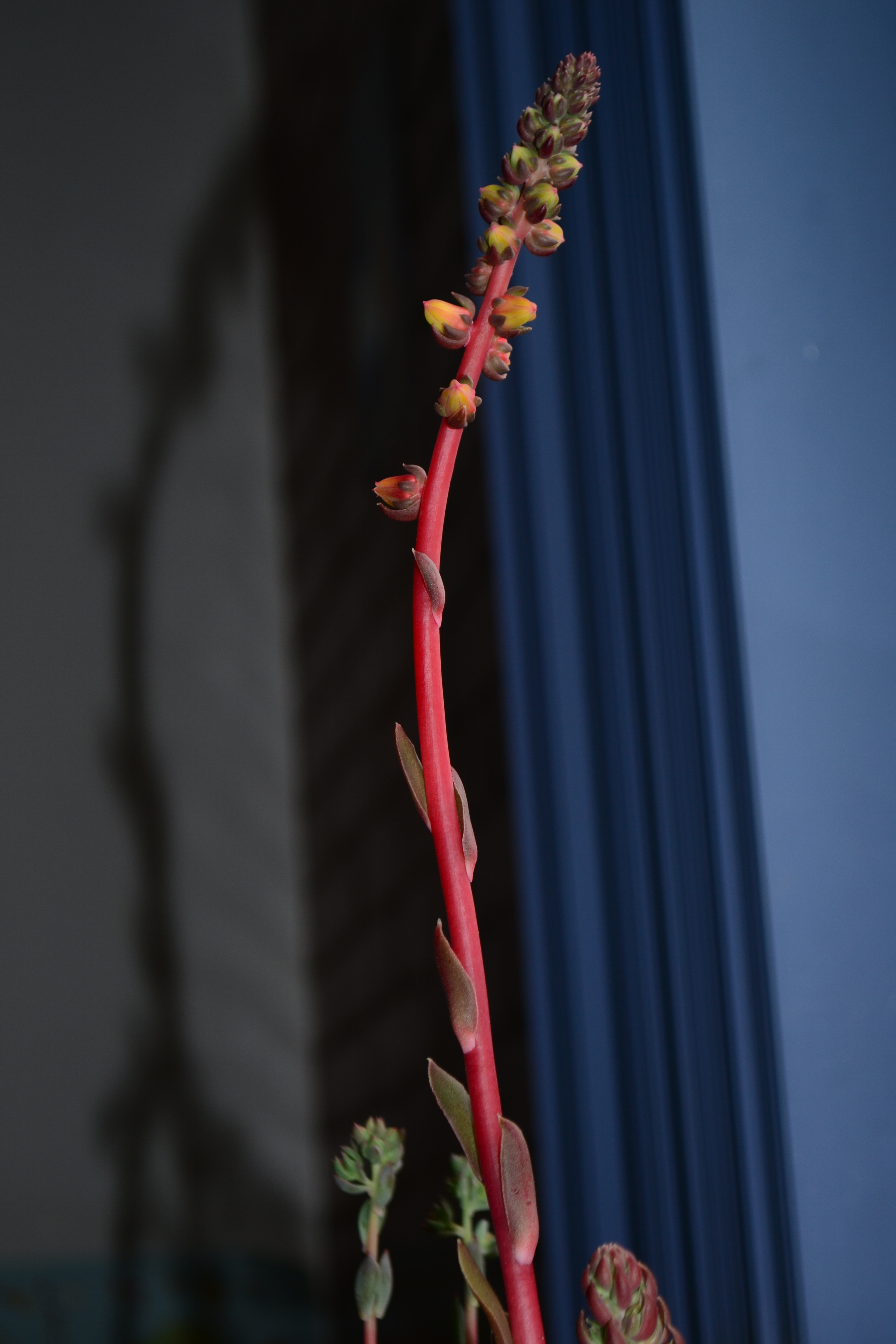 cultivo